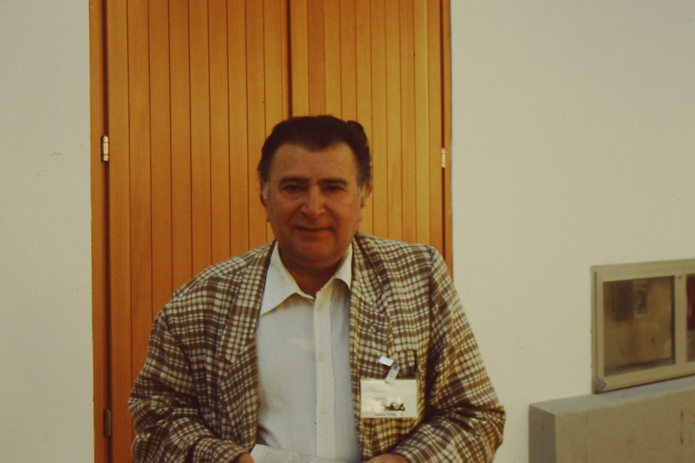 Angelo R. Humouda at Giornate del cinema muto, Pordenone 1/8 october 1988